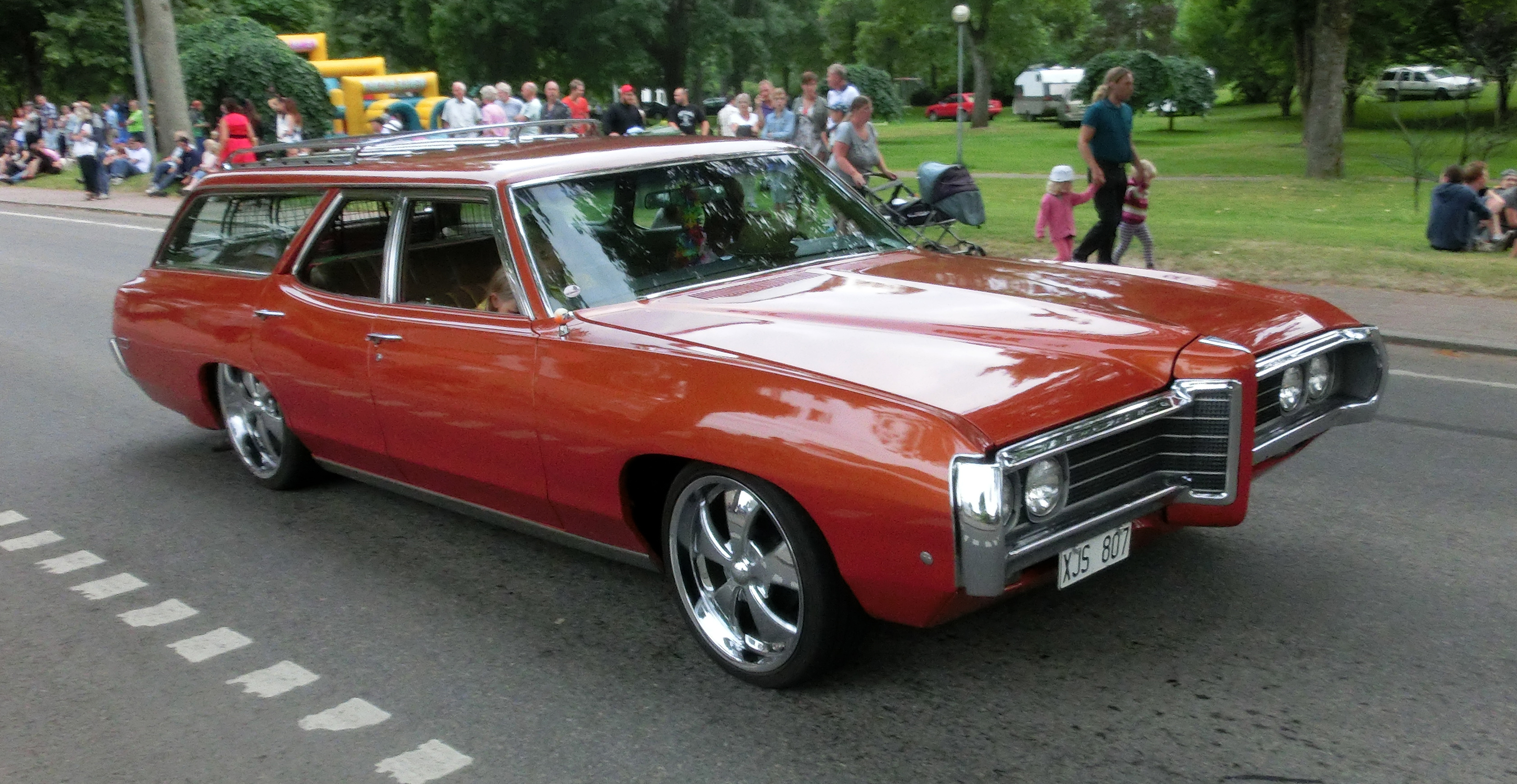 En brun Pontiac Executive Safari 1969 på cruising i Falköping 2013-07-27.